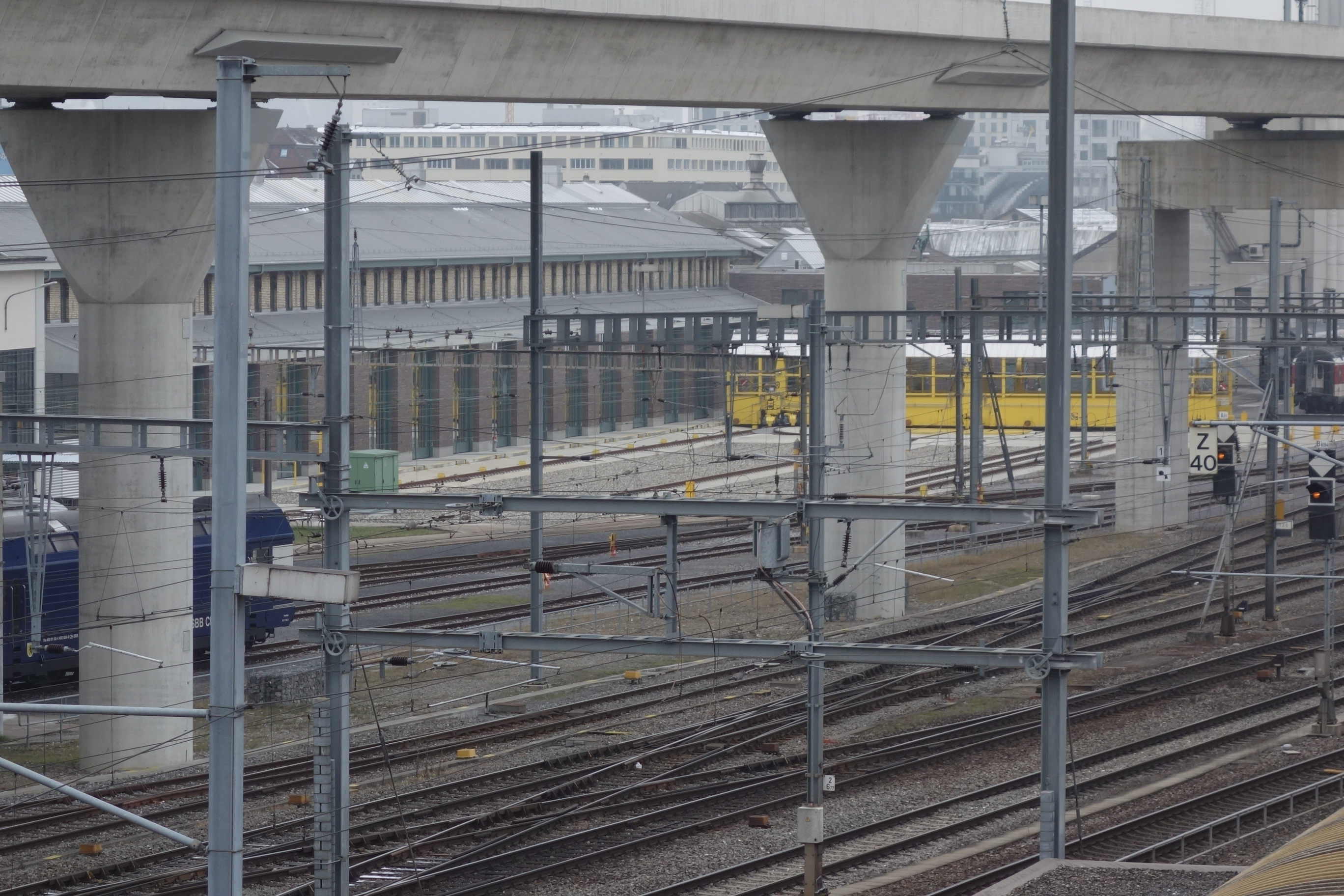 Gelbe Drehverschiebungseinrichtung für Lokomotiven und Reisezugwagen (bis 30 m) im Reparaturcenter SBB Zürich Altstetten. Sie gilt als weltweit einzigartig, weil die Drehscheibe sowohl drehen als auch schieben kann.